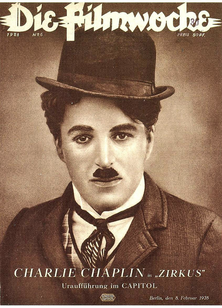 Cover der Zeitschrift Die Filmwoche 1928 Nr. 6 mit Charlie Chaplin